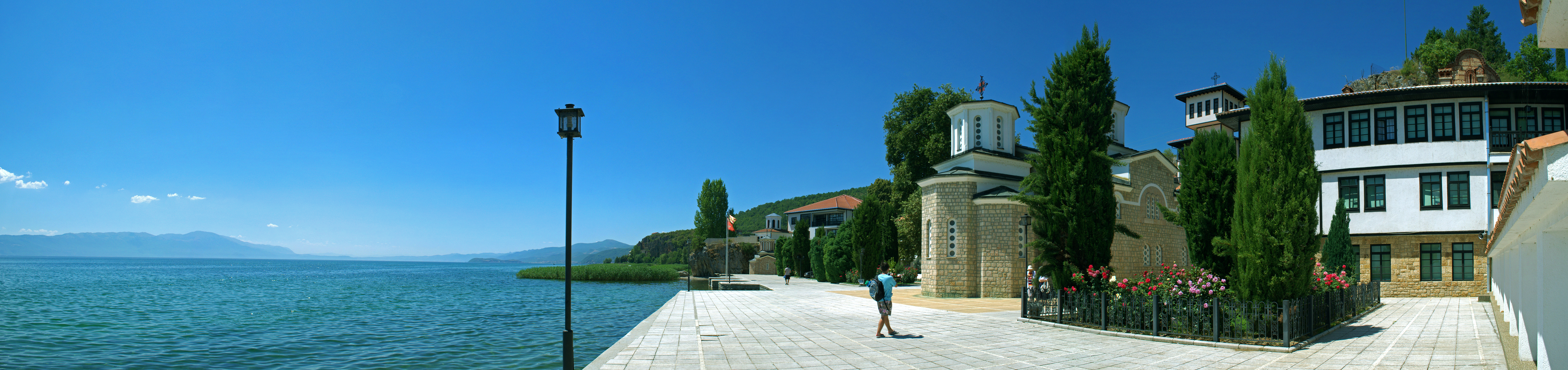 Манастир Св. Богородица во близина на селото Калишта, Охридско Езеро